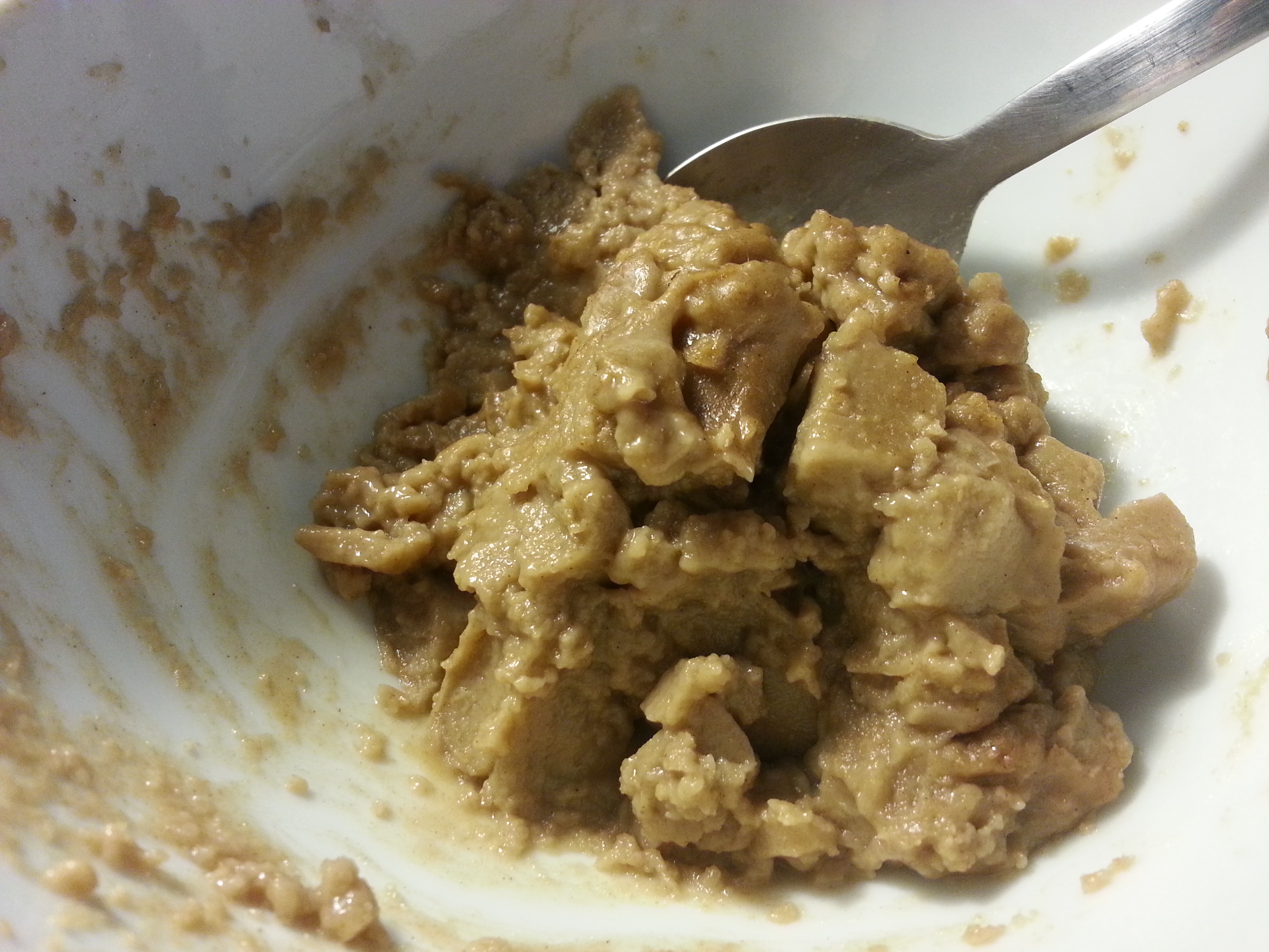 Plat du pauvre en Basse-Bretagne